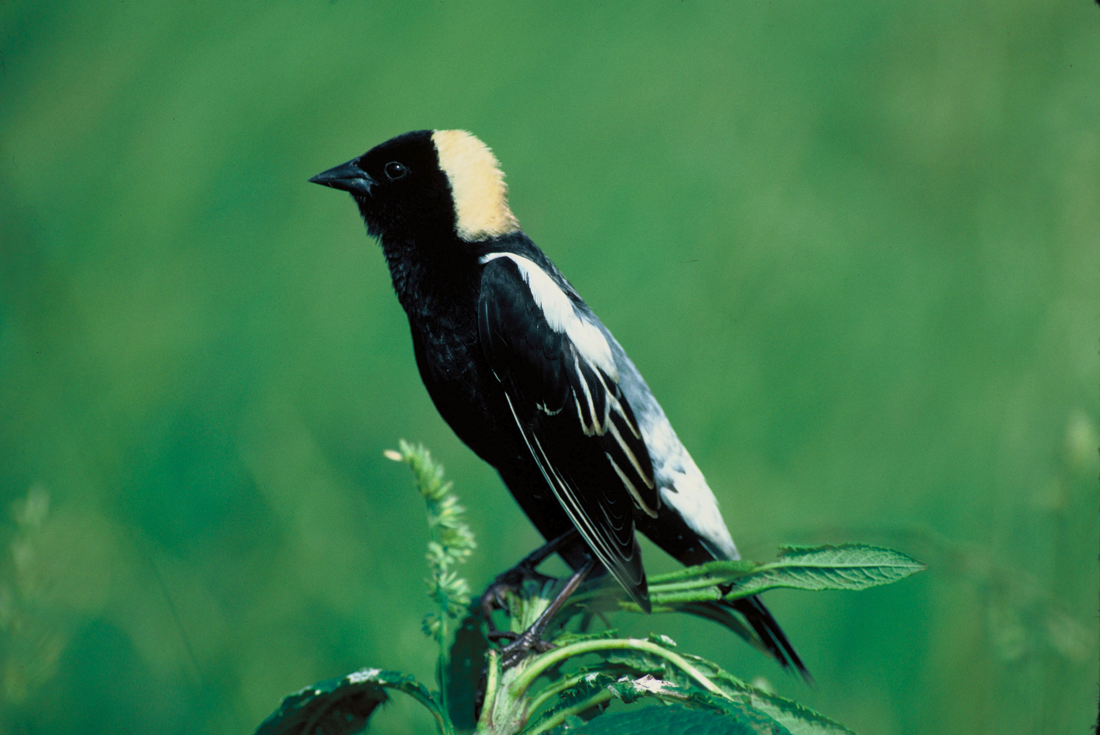 Bobolink (Dolichonyx oryzivorus); Reisstärling, Bobofink